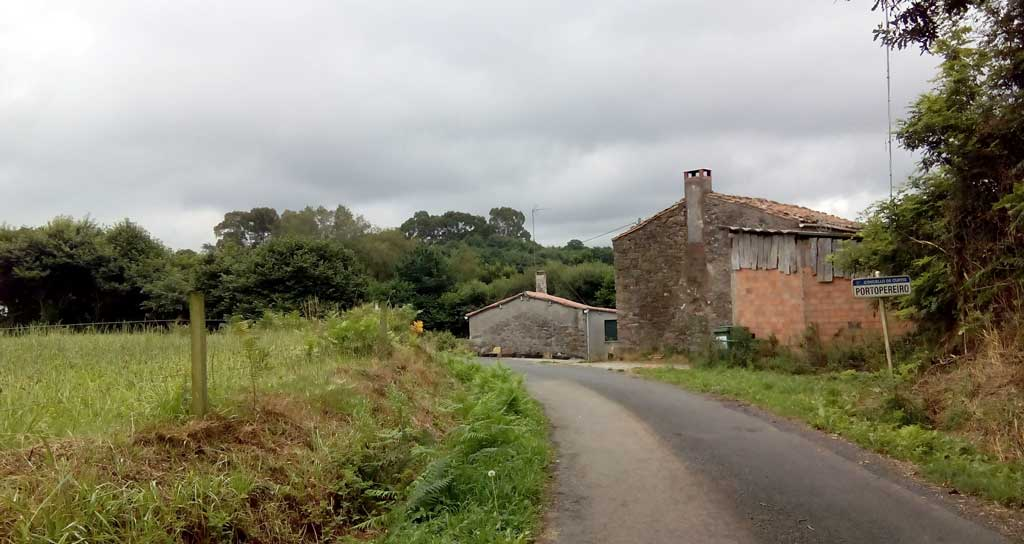 Vista de Portopereiro, Curtis.